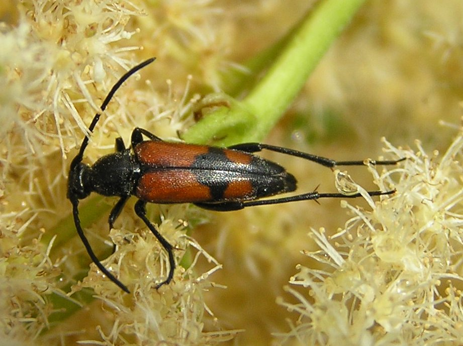 Stenurella bifasciata in Aruncus sylvestris